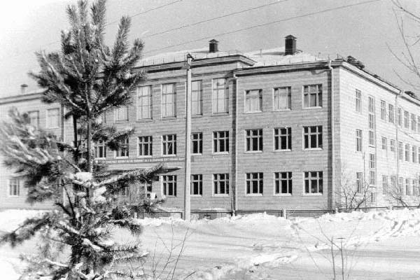 Здание по адресу Детский проезд 10 во время расположения в нём Школы №130